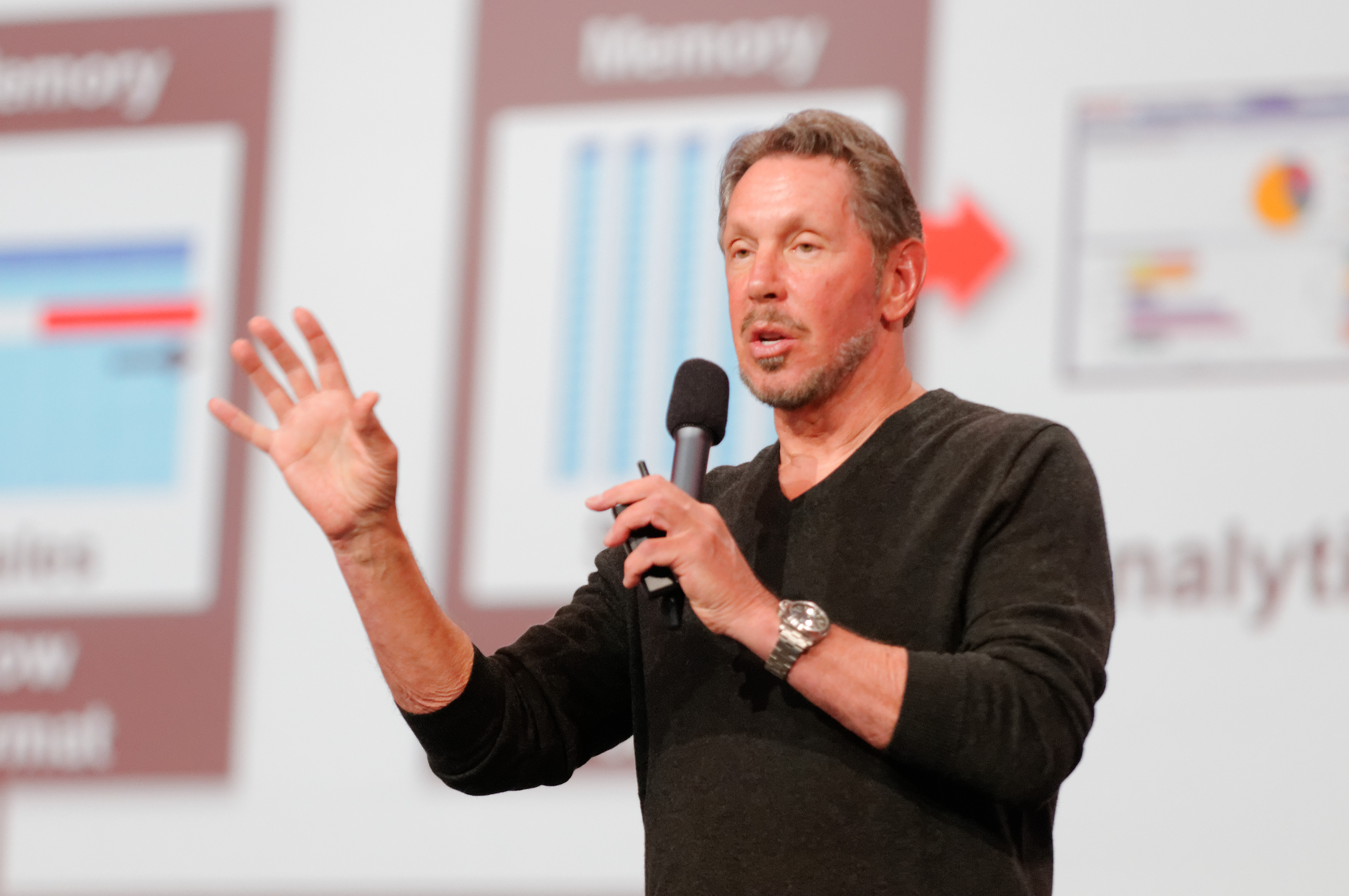 Larry Ellison 2013